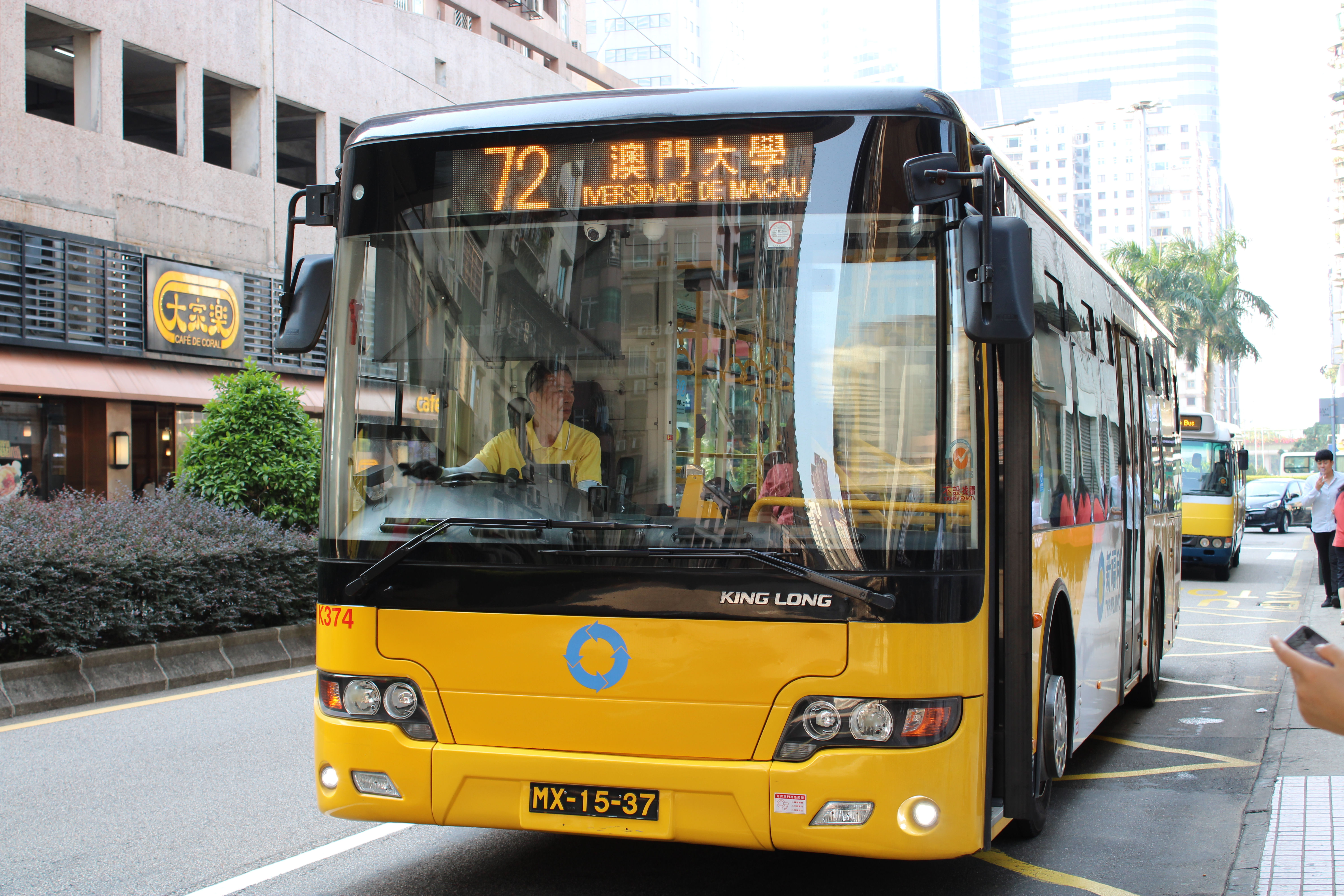 新福利2017年蘇州金龍KLQ6108GQE5行駛72路線。